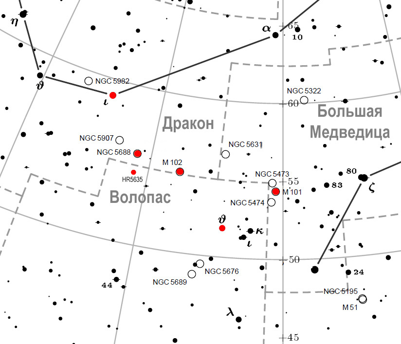 Окрестность звёзд θ Волопаса и ι Дракона, где находился объект, обозначенный Мешеном как M102.